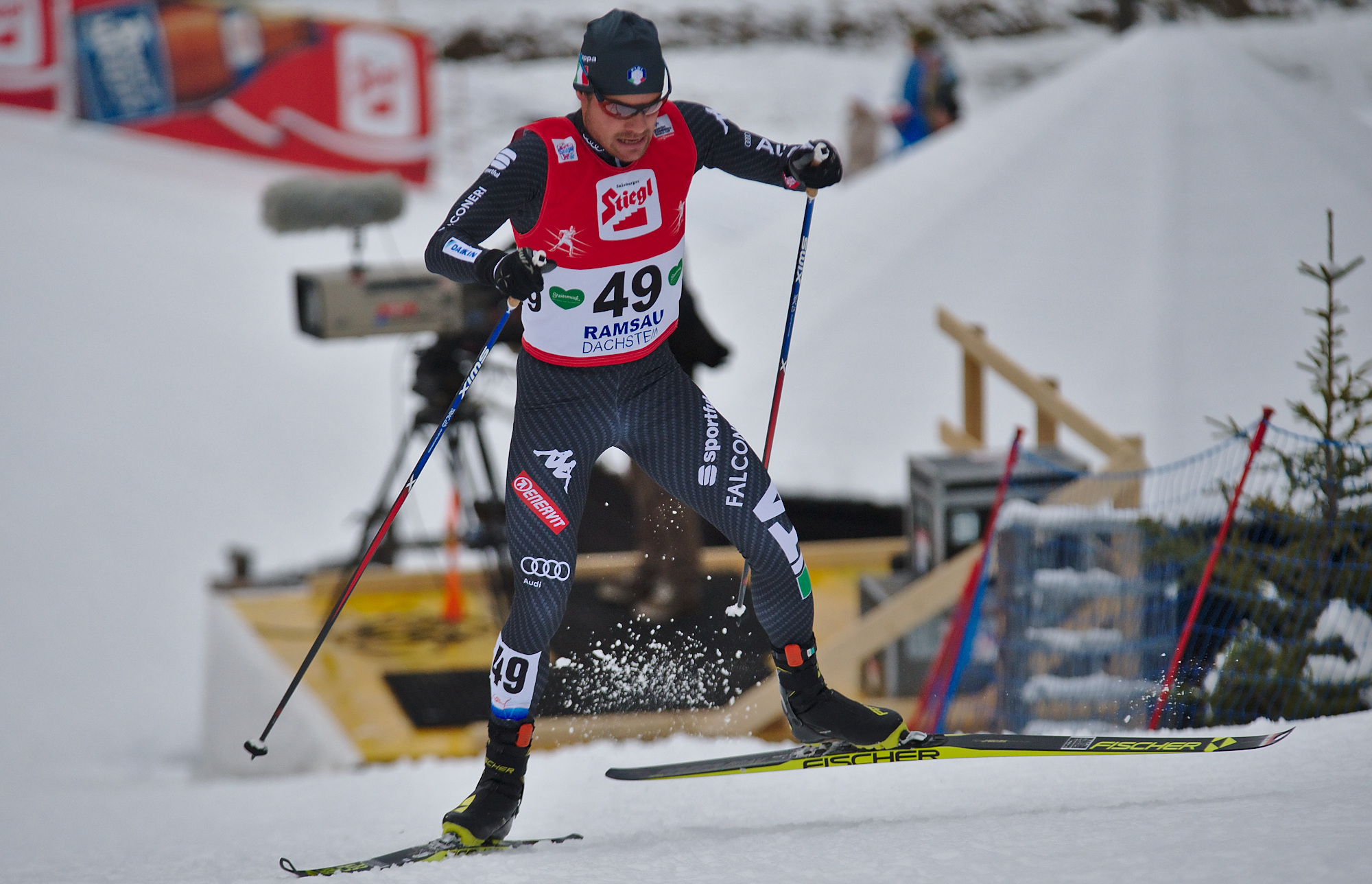 FIS Worldcup Nordic Combined Ramsau 2016. Bild zeigt Lukas Runggaldier (ITA)